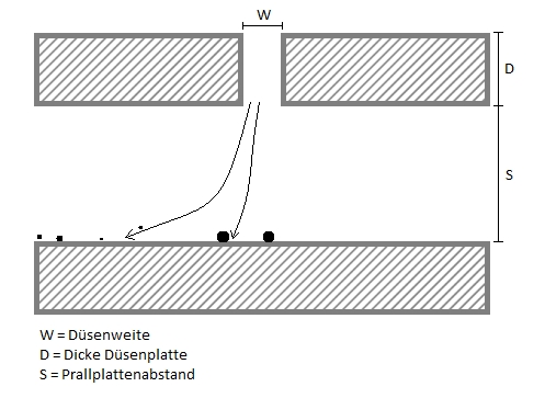 Diese Grafik zeigt das Funktionsprinzip der Impaktorstufe an.